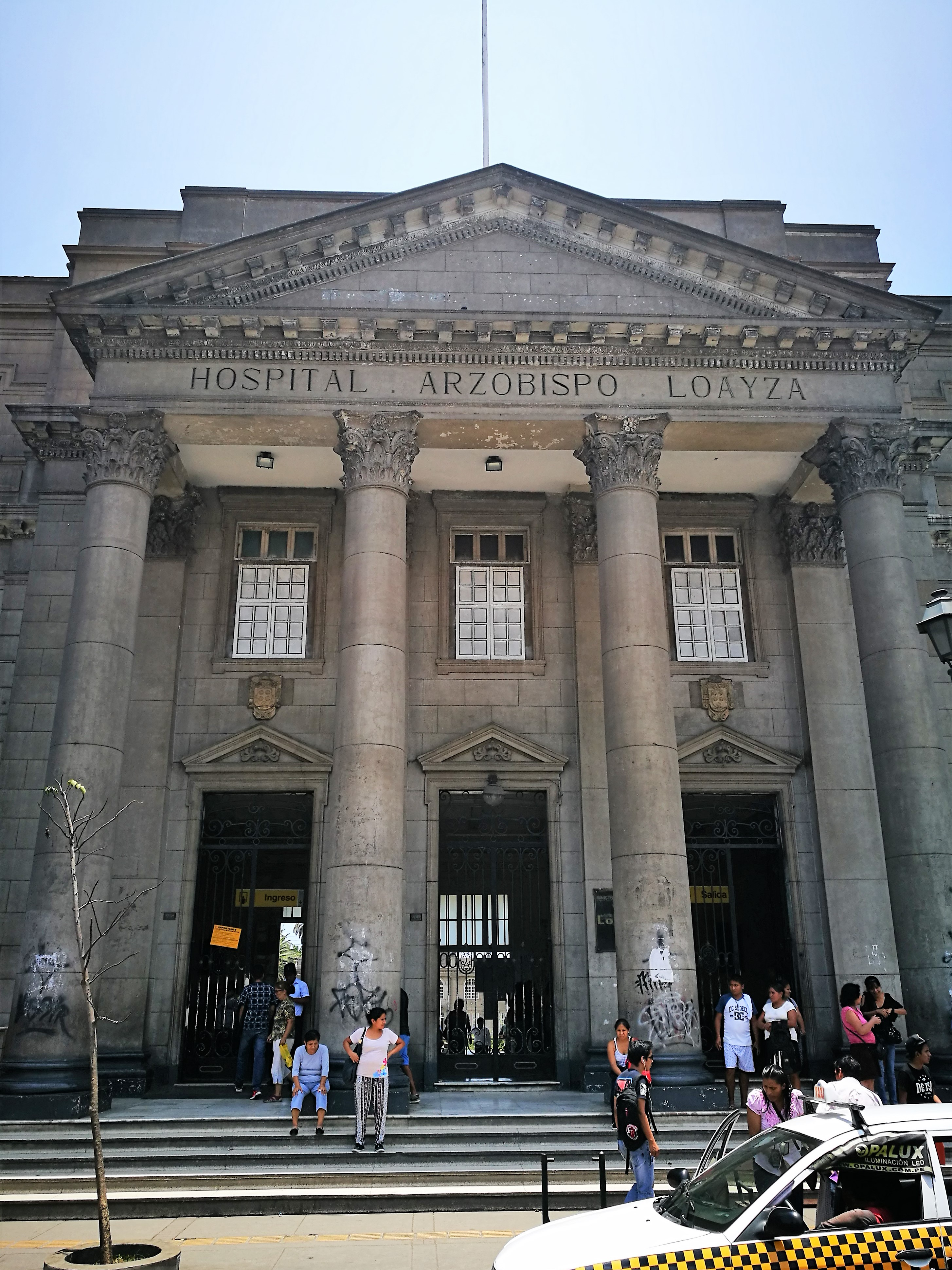 Hospital Nacional Arzobisco Loayza a l'Avenida Alfonso Ugarte de Lima